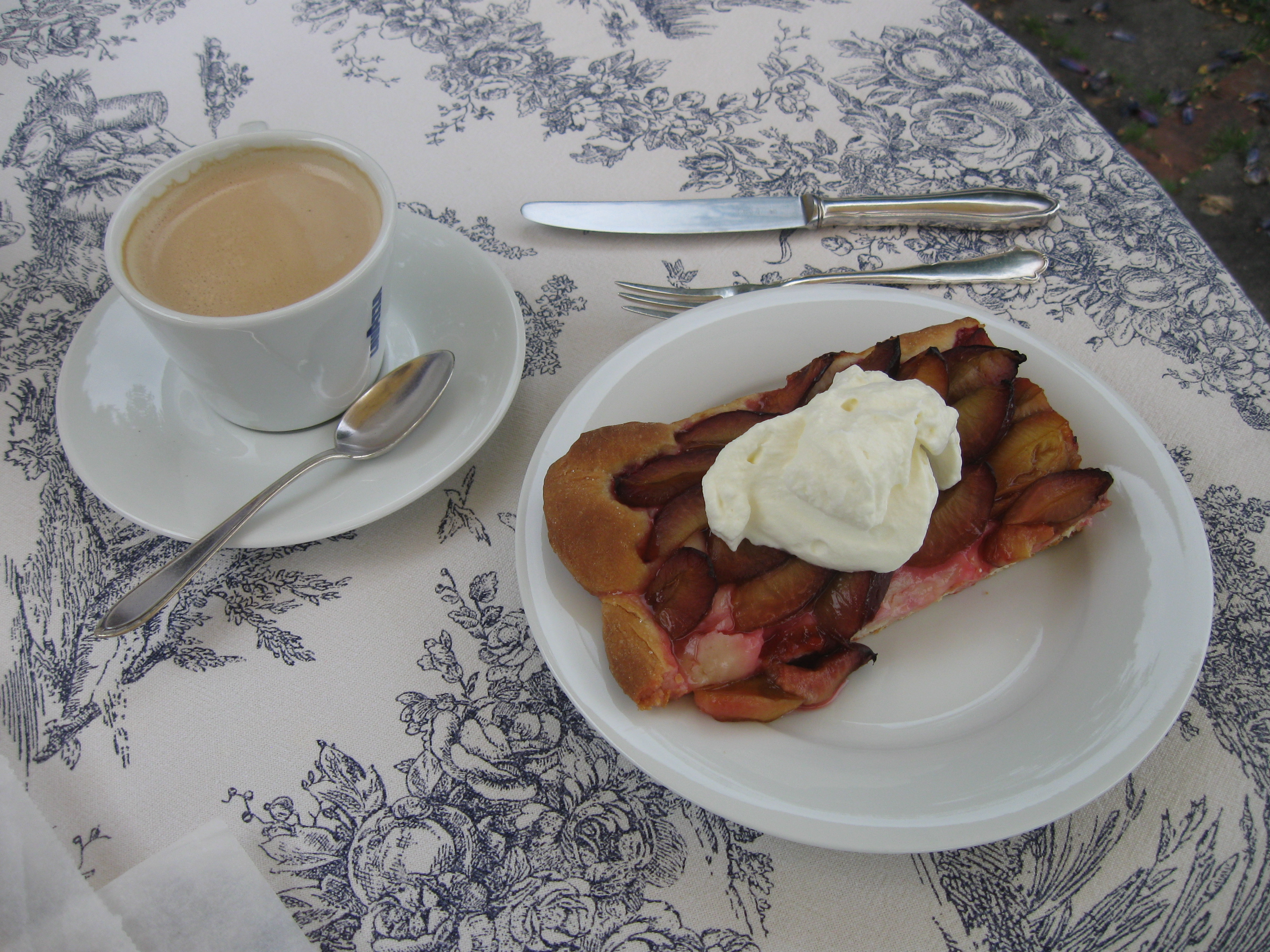 Pflaumenkuchen mit frisch geschlagener Sahne und einer Tasse Kaffee, typischerweise mit Messer und Gabel verzehrt